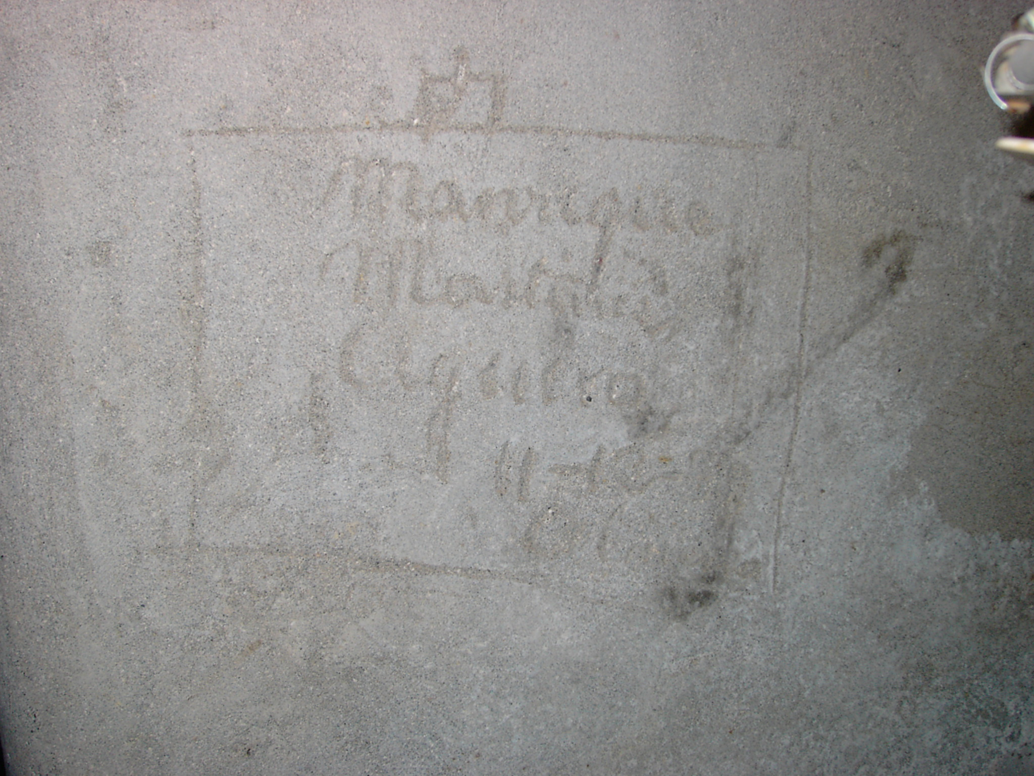 Refugios subterráneos de Almería (construidos durante la Guerra Civil Española) visitados antes de su restauración.